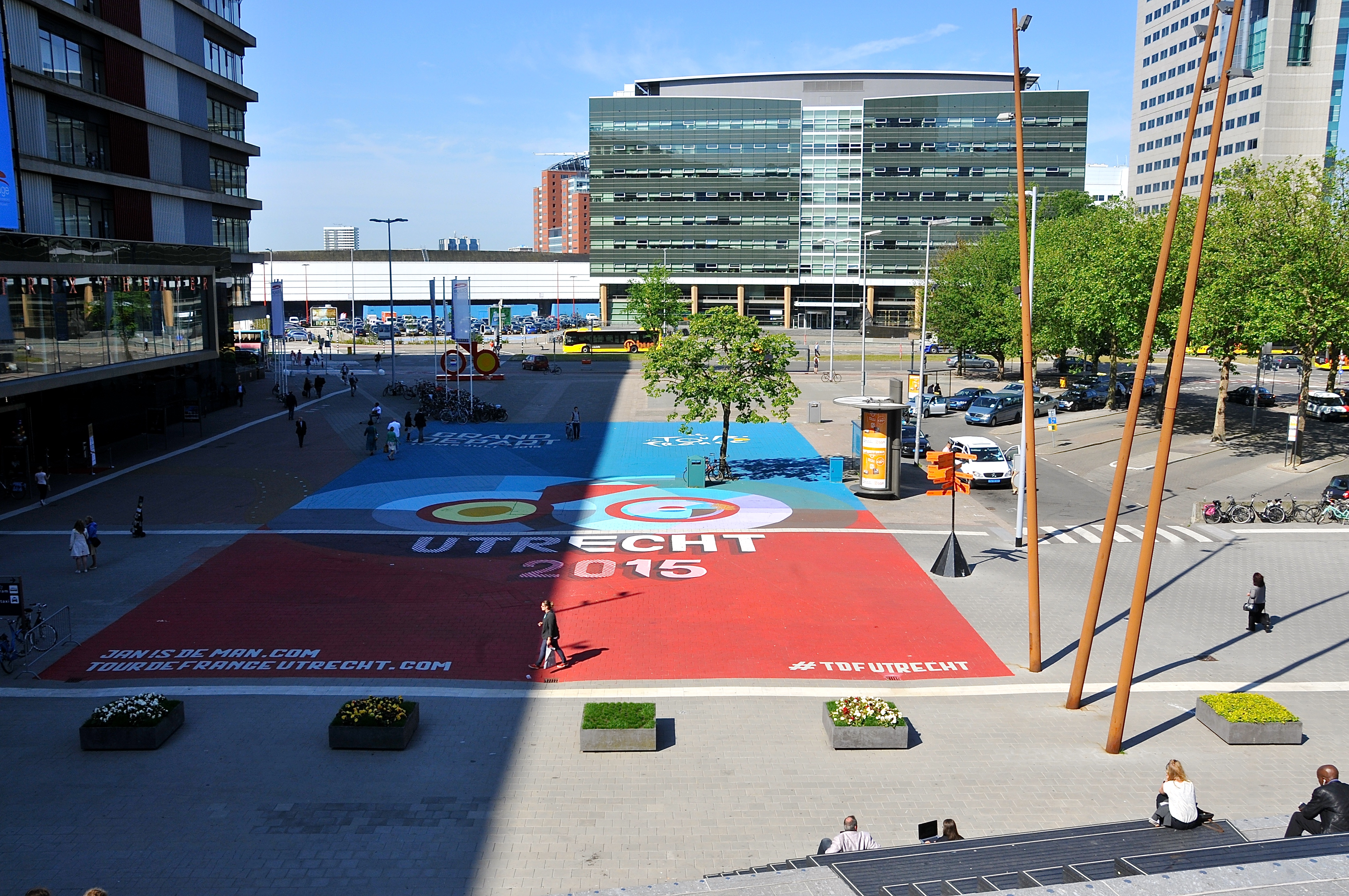 Le Grand Départ 2015 is about to happen! Het tableau is gemaakt door kunstenaar Jan Is De Man.